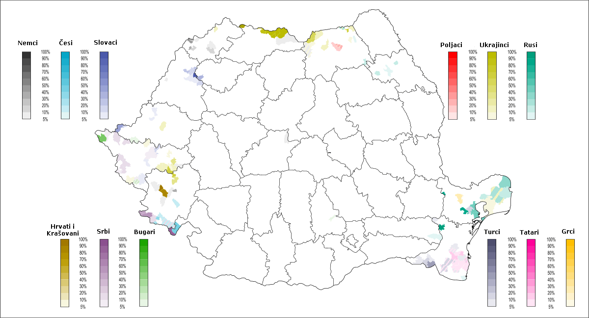 Етничка карта Румуније